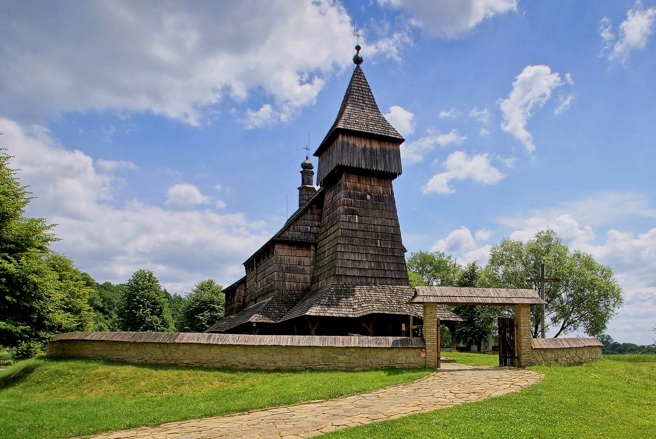 Kościół z Bączala Dolnego, obecnie w Muzeum Budownictwa Ludowego w Sanoku.